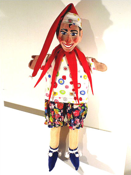 Kasperle, Handpuppe mit Beinen